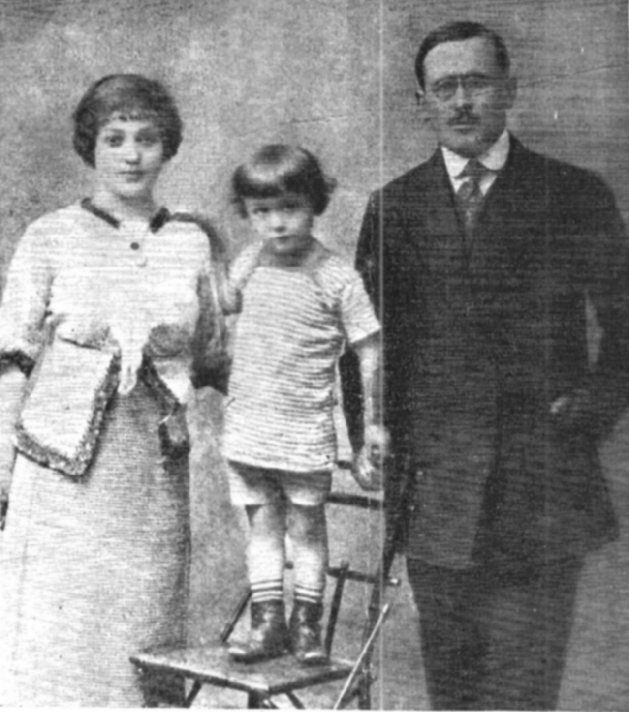 skan czasopisma PL, Wiadomości Literackie 5 XII 1937 nr 50 (736)Numer specjalny poświęcony Zbigniewowi Uniłowskiemu.